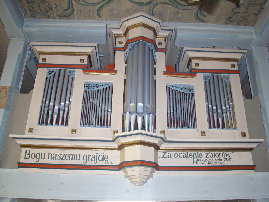 Organy